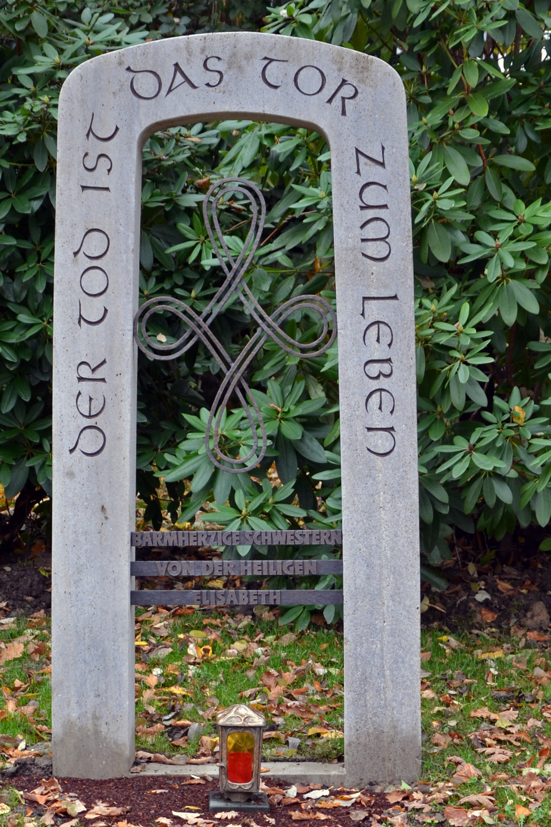 Essen, Ostfriedhof: Legat-Grab des Ordens der Schwestern von der hl. Elisabeth